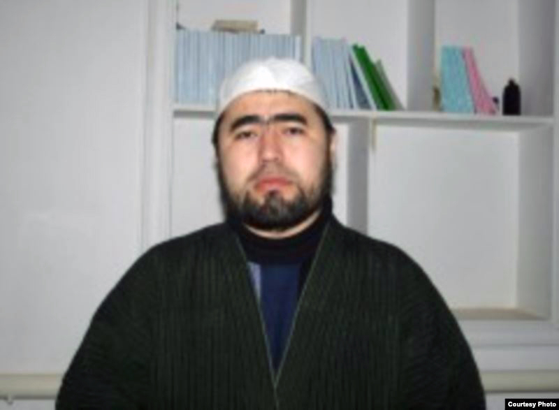 Мирзаев Абдулкуддус